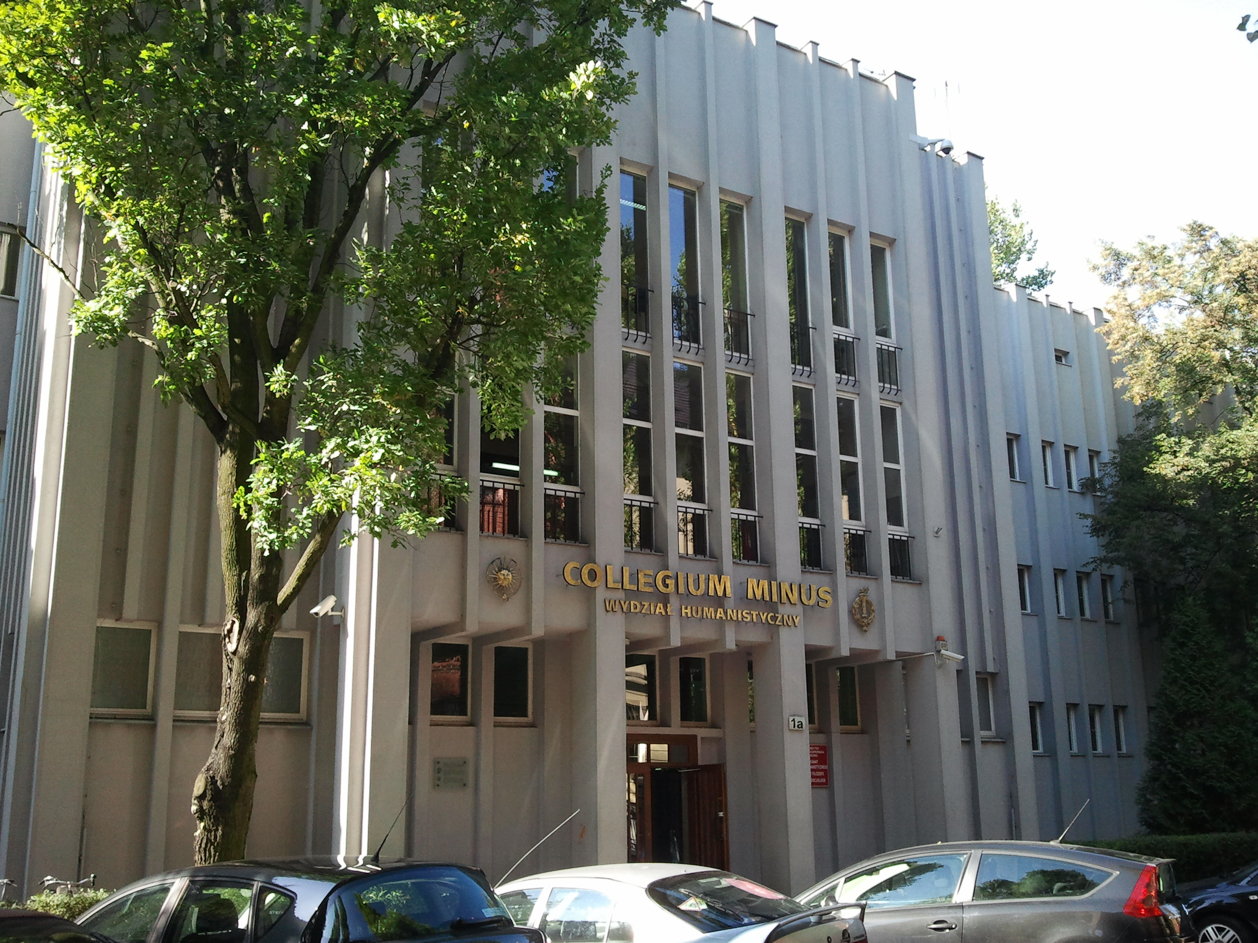 Toruń, ul. Fosa Staromiejska 1 a - dawny gmach Starostwa Pomorskiego, obecnie Wydział Humanistyczny UMK, 1935-36 (zabytek nr A/1349 z 11 lutego 2008)